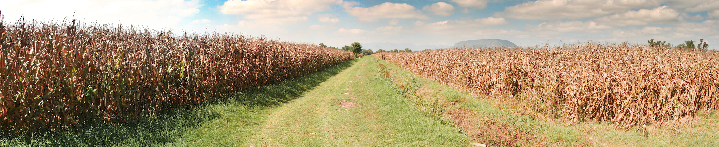 Las aguas del mar rojo se abren a nuestros pies